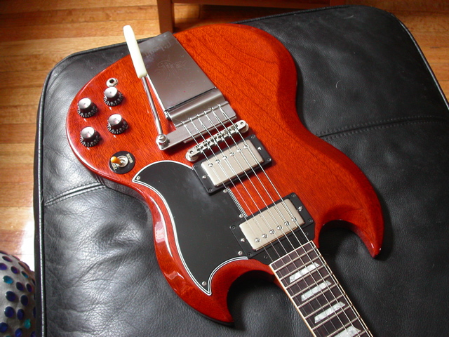 Gibson SG/LP